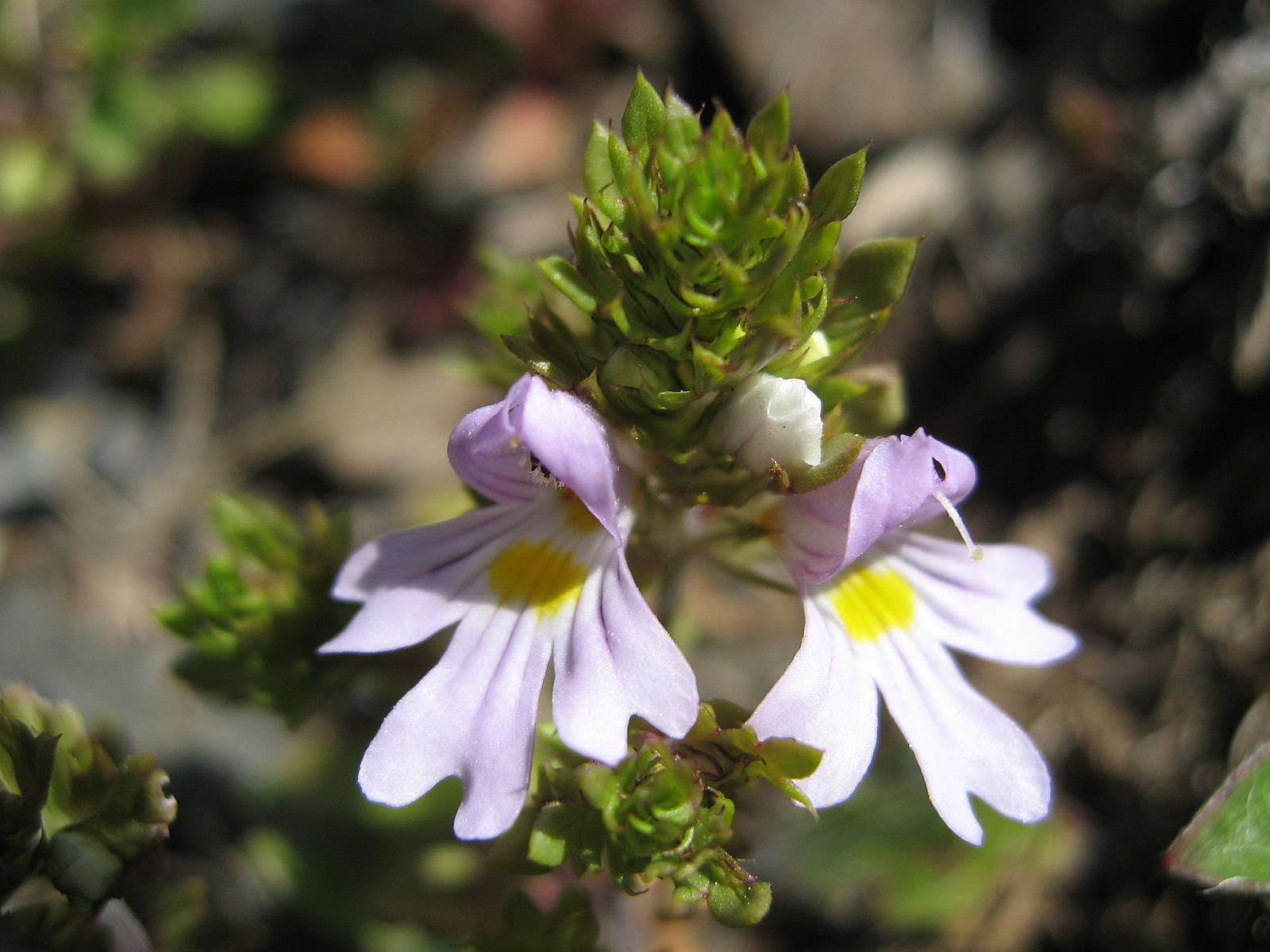 Salzburger Augentrost (Euphrasia salisburgensis)